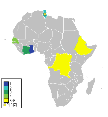 1965년 아프리카 네이션스컵 정보